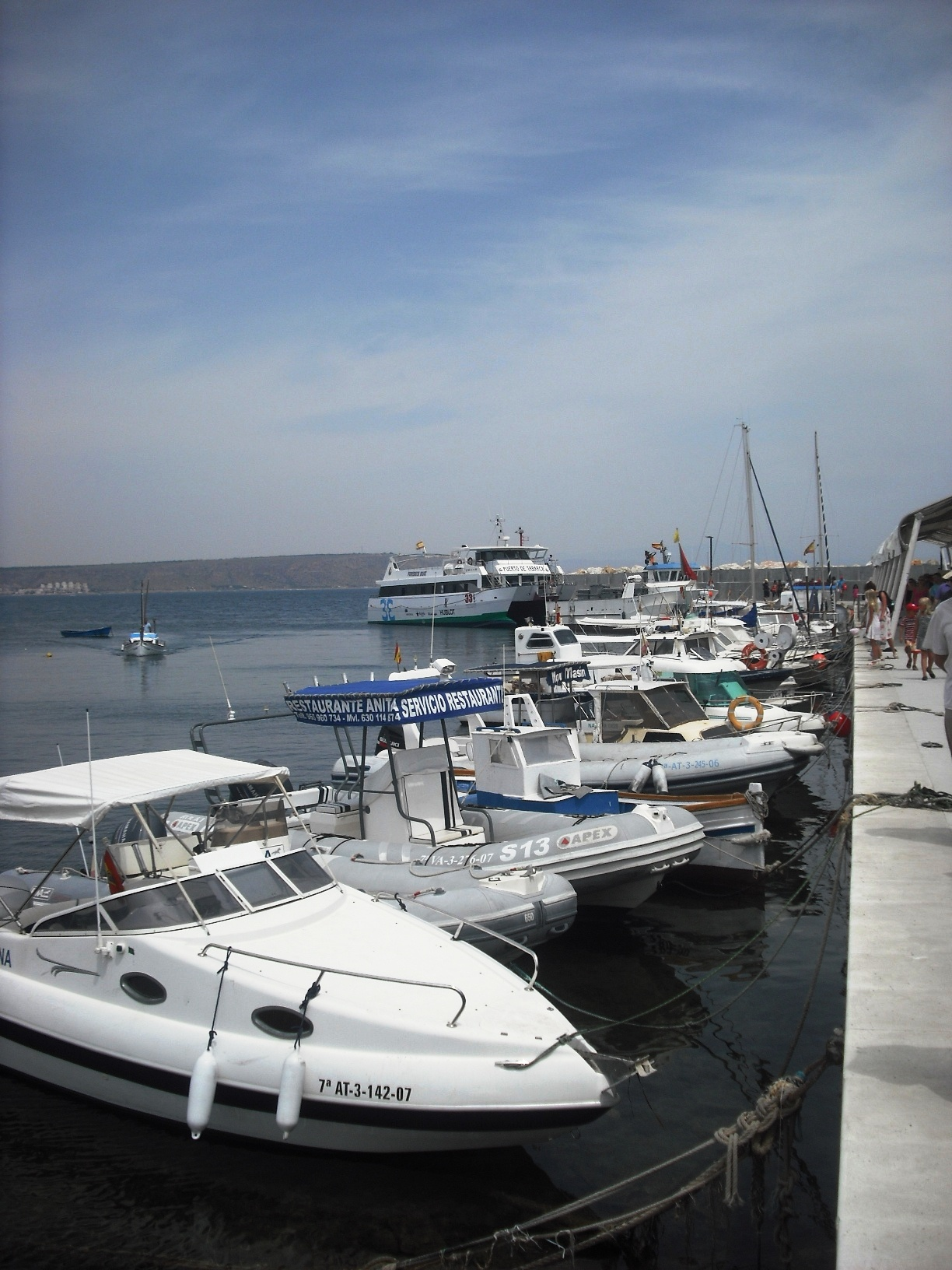 Port de Tabarca.